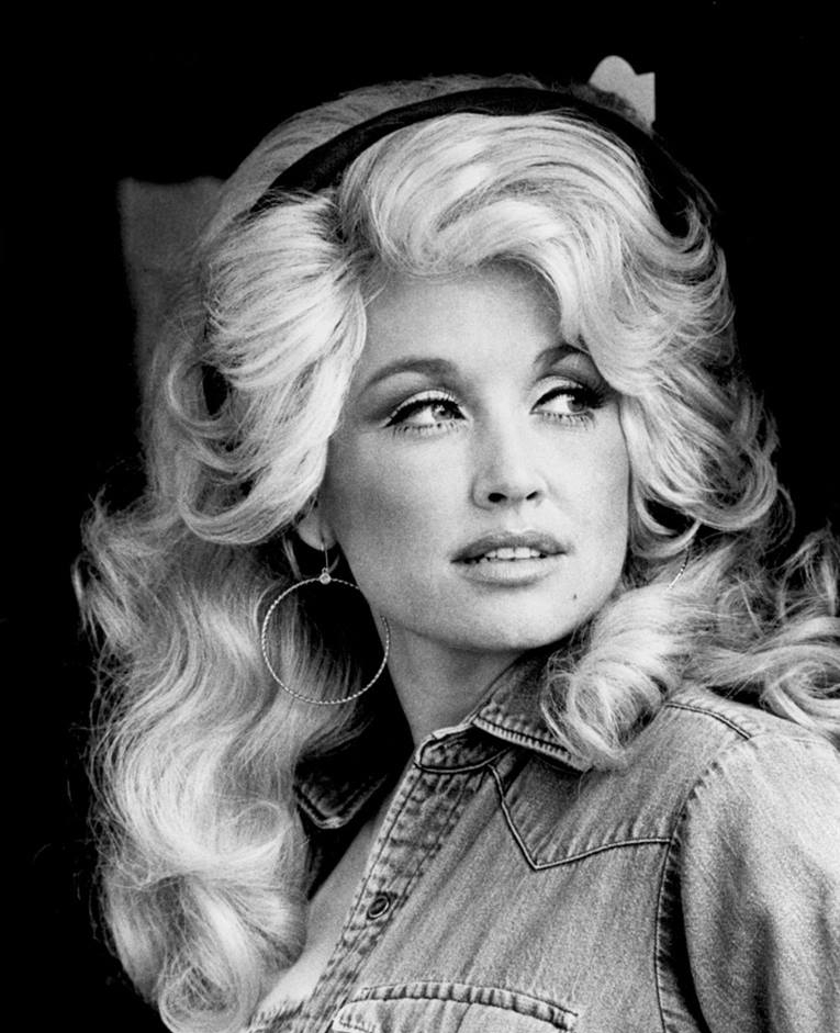 Imagen publicitaria de la cantante estadounidense Dolly Parton, 1977.